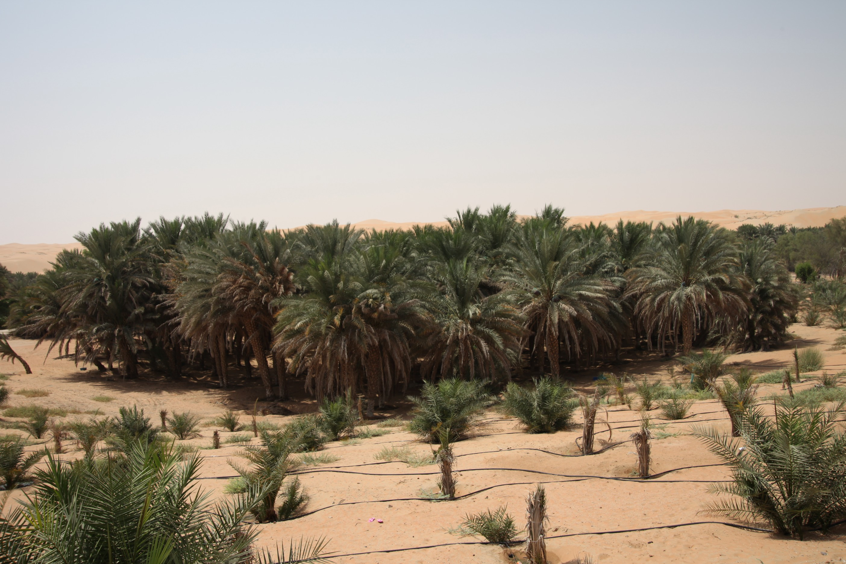 liwa شيا